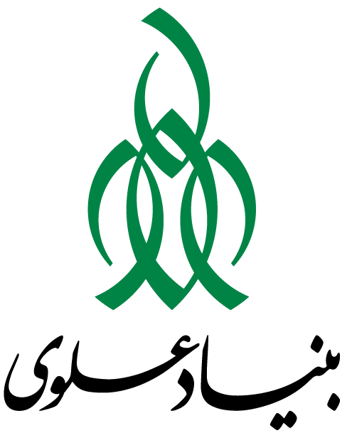 لوگوی بنیاد علوی